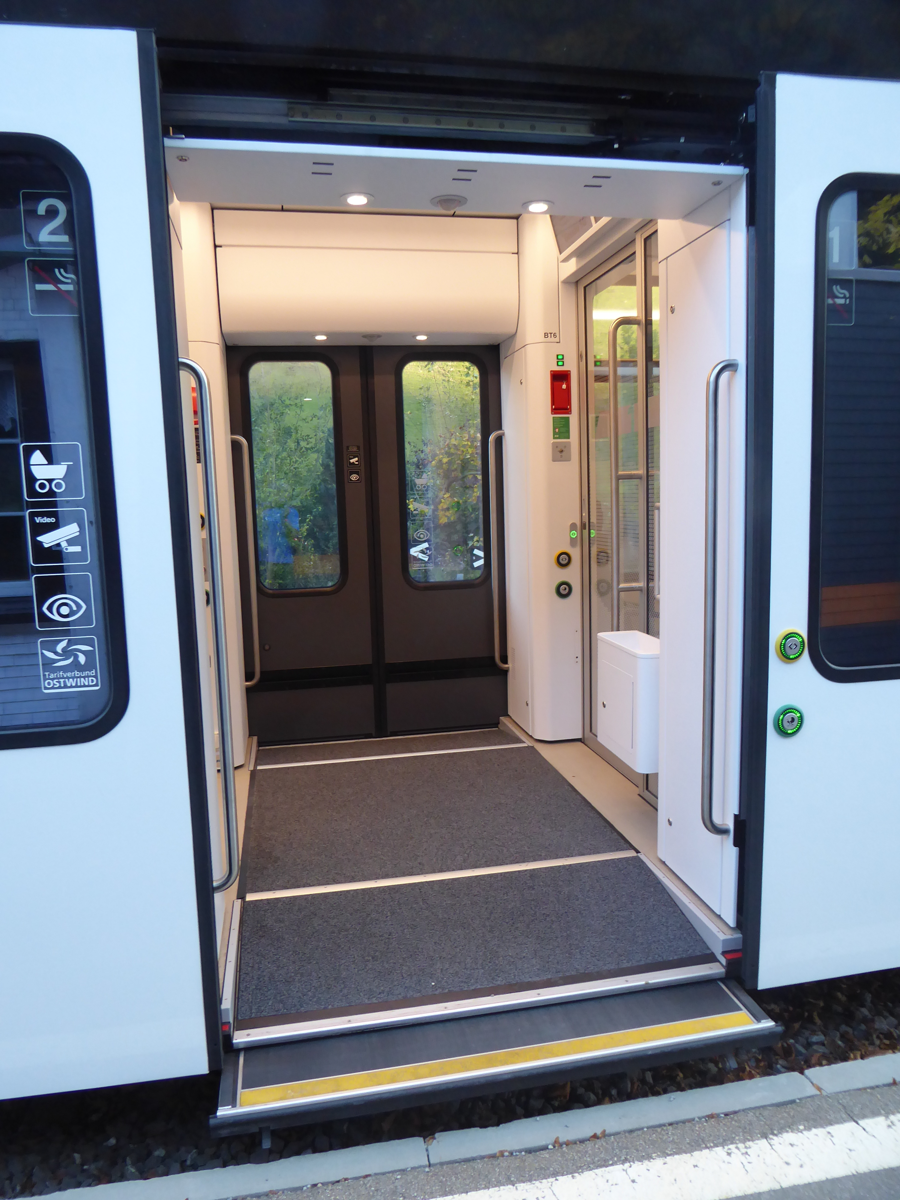 Einstiegstüre mit Schiebetritt ABe 4/12 „Walzer“ der Appenzeller Bahnen (AB)